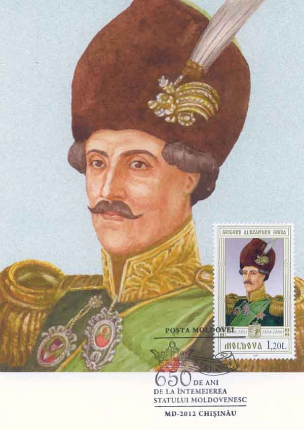 Grigore Alexandru Ghica